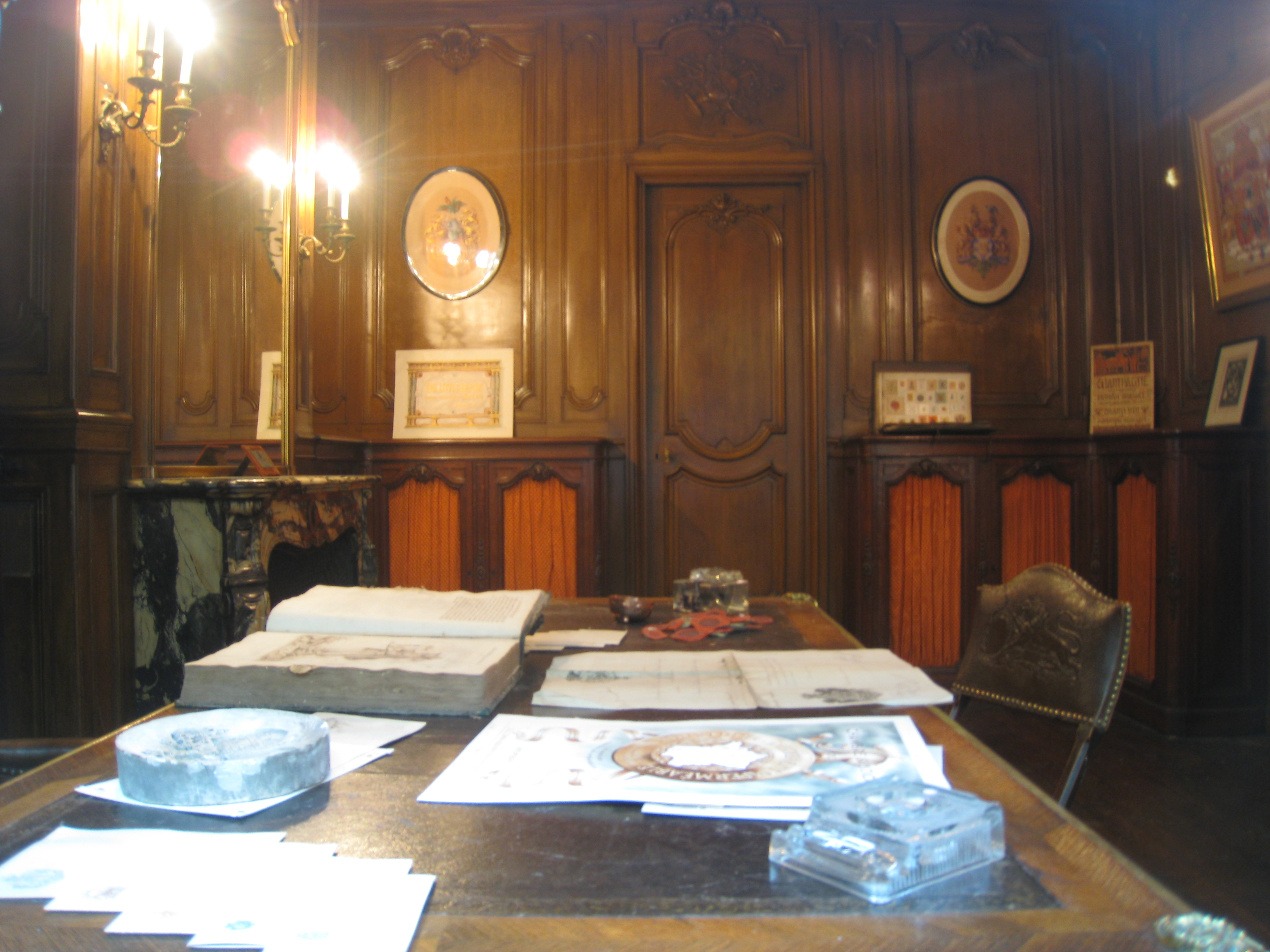 Image de la boutique Stern, graveur à Paris depuis 1836, à travers la vitrine (poor quality), IIe arrondissement, Passage des Panoramas. La façade et l'intérieur de la boutique, datant de 1840, sont inscrits au titre des monuments historiques depuis le 7 juillet 1974.